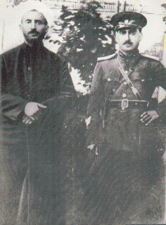 Кази Мухаммед и Мустафа Барзани Кази Мухаммед и Мустафа Барзани в форме генерала Мехабадской республики.